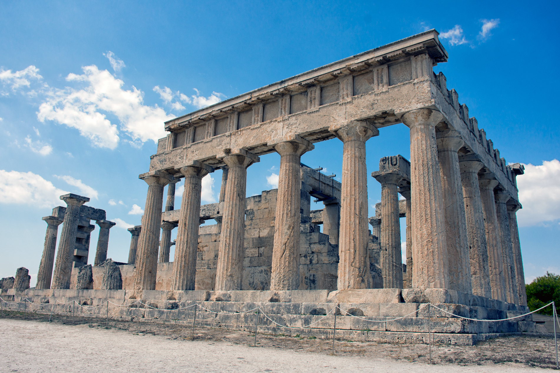 Αρχαιολογικός Χώρος Αφαίας«Αρχαιολογικός Χώρος Αφαίας»